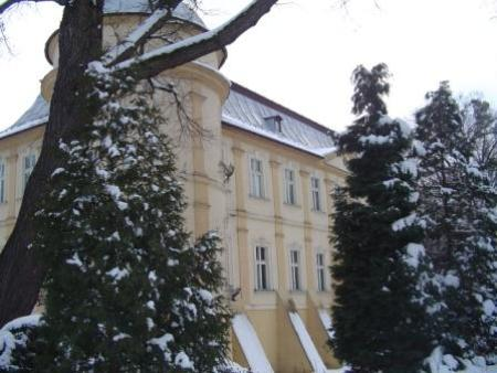 Chałupki, ul. Graniczna - pałac